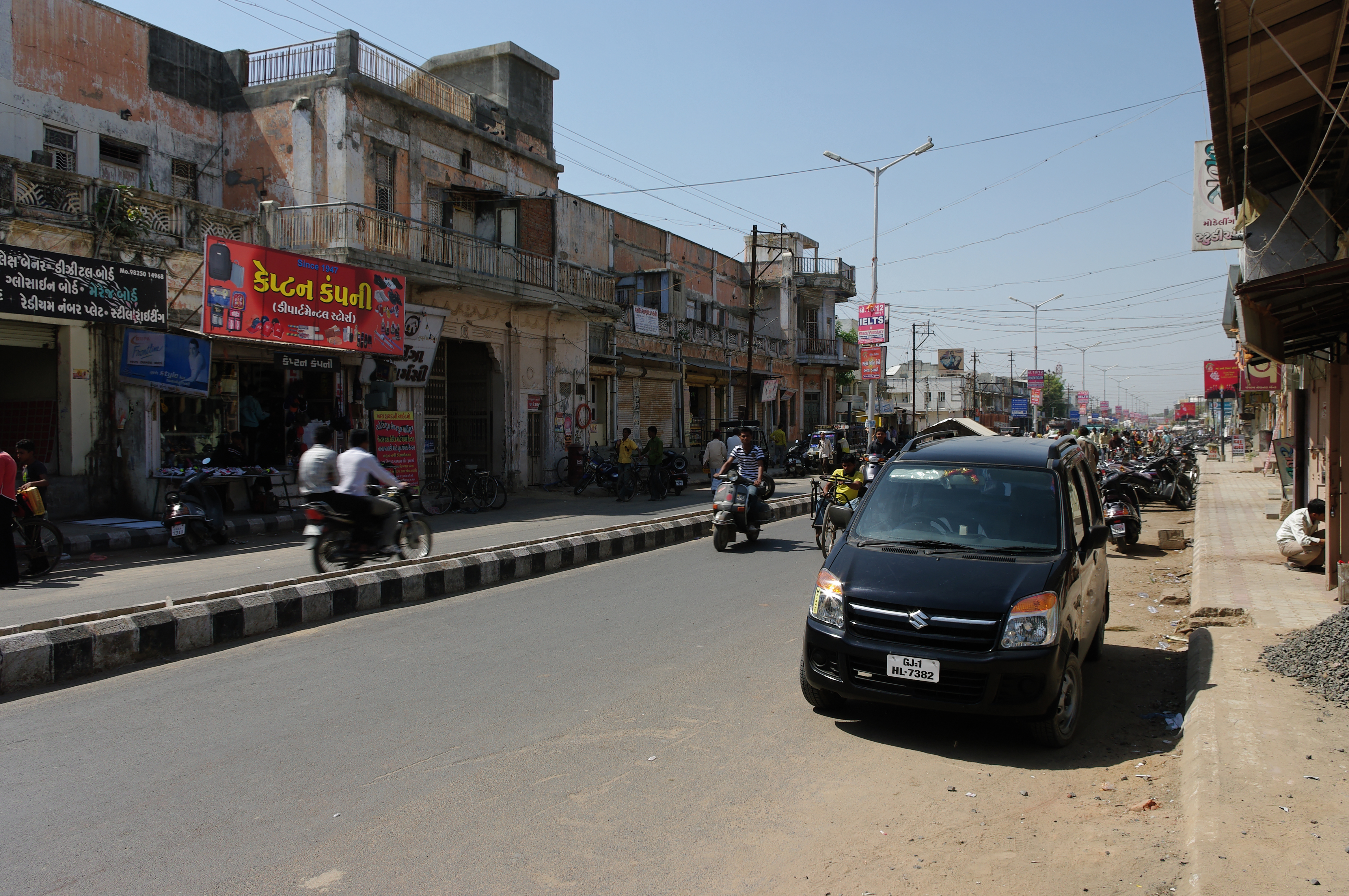 Unjha - Gujarat, India